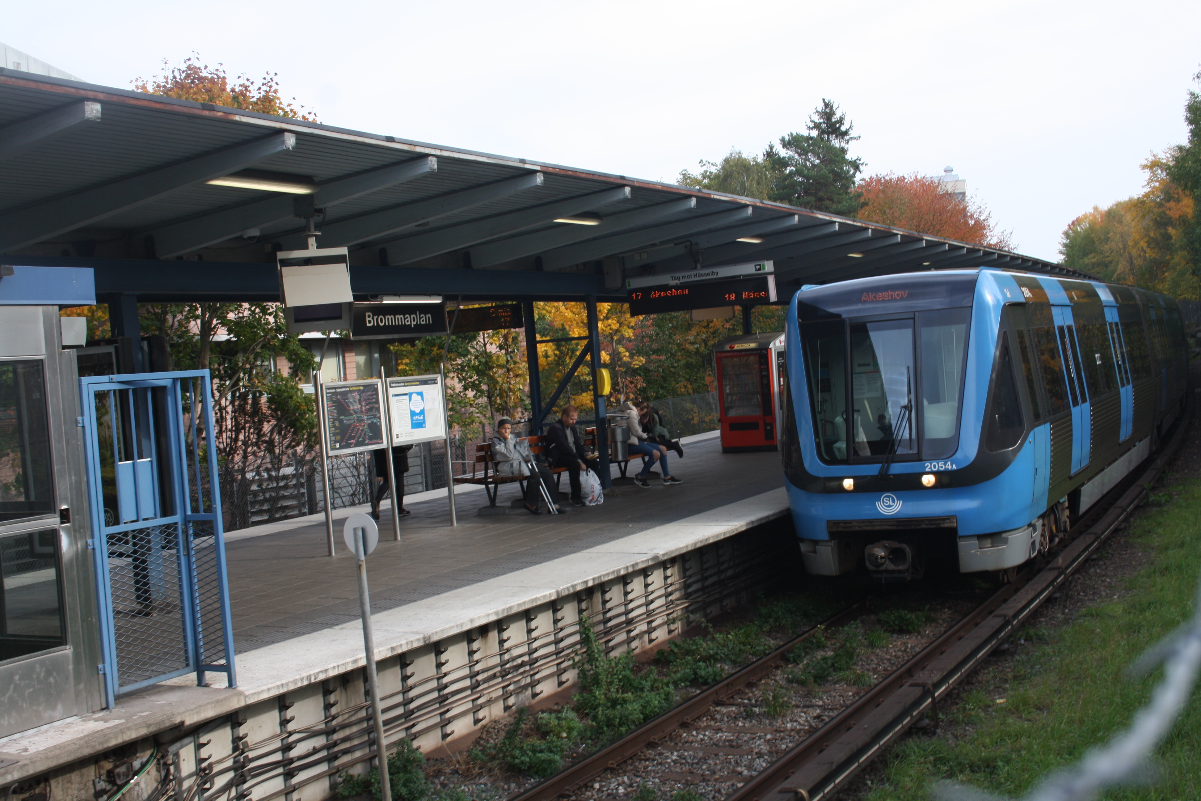 Brommaplan tunnelbana